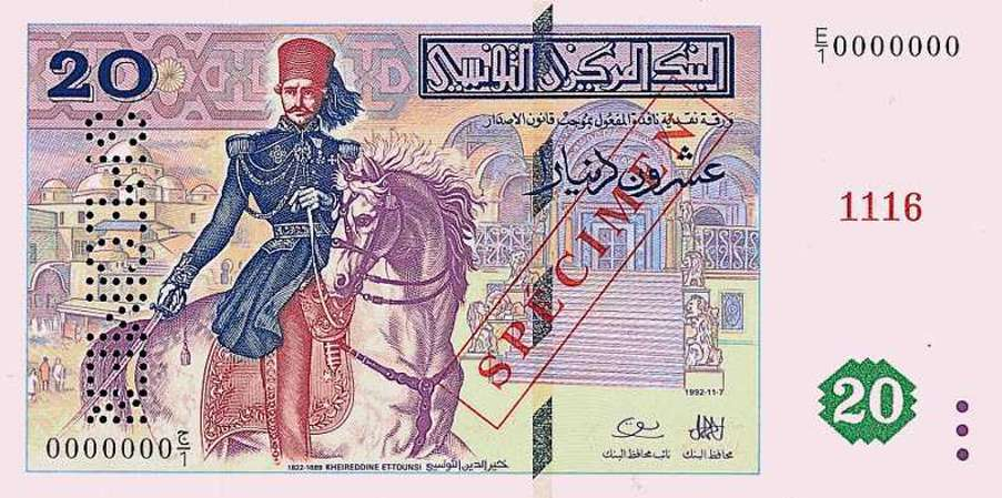 20 Tunisian dinar (obverse)